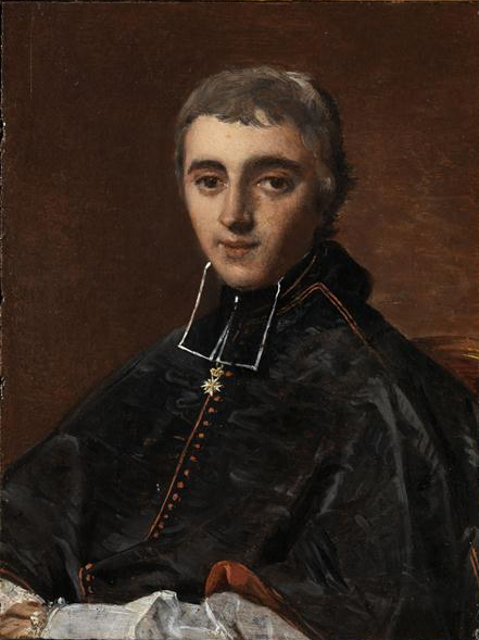 Louis-Jacques-Maurice de Bonald (1787–1870), homme d'Église français, archevêque de Lyon de 1839 à 1870, peint par Ingres à Rome au mois de mai en 1816.